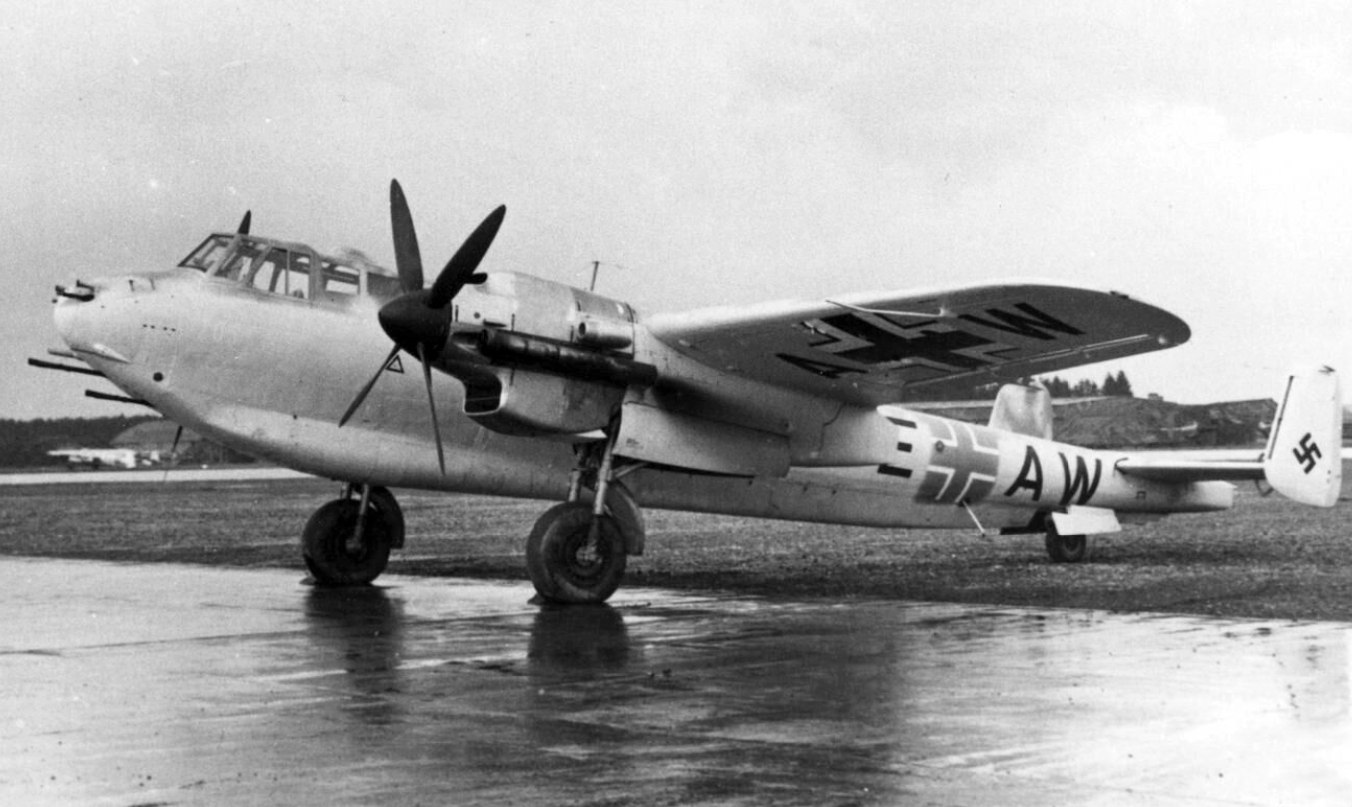 A German Dornier Do 217 N-2 night fighter.